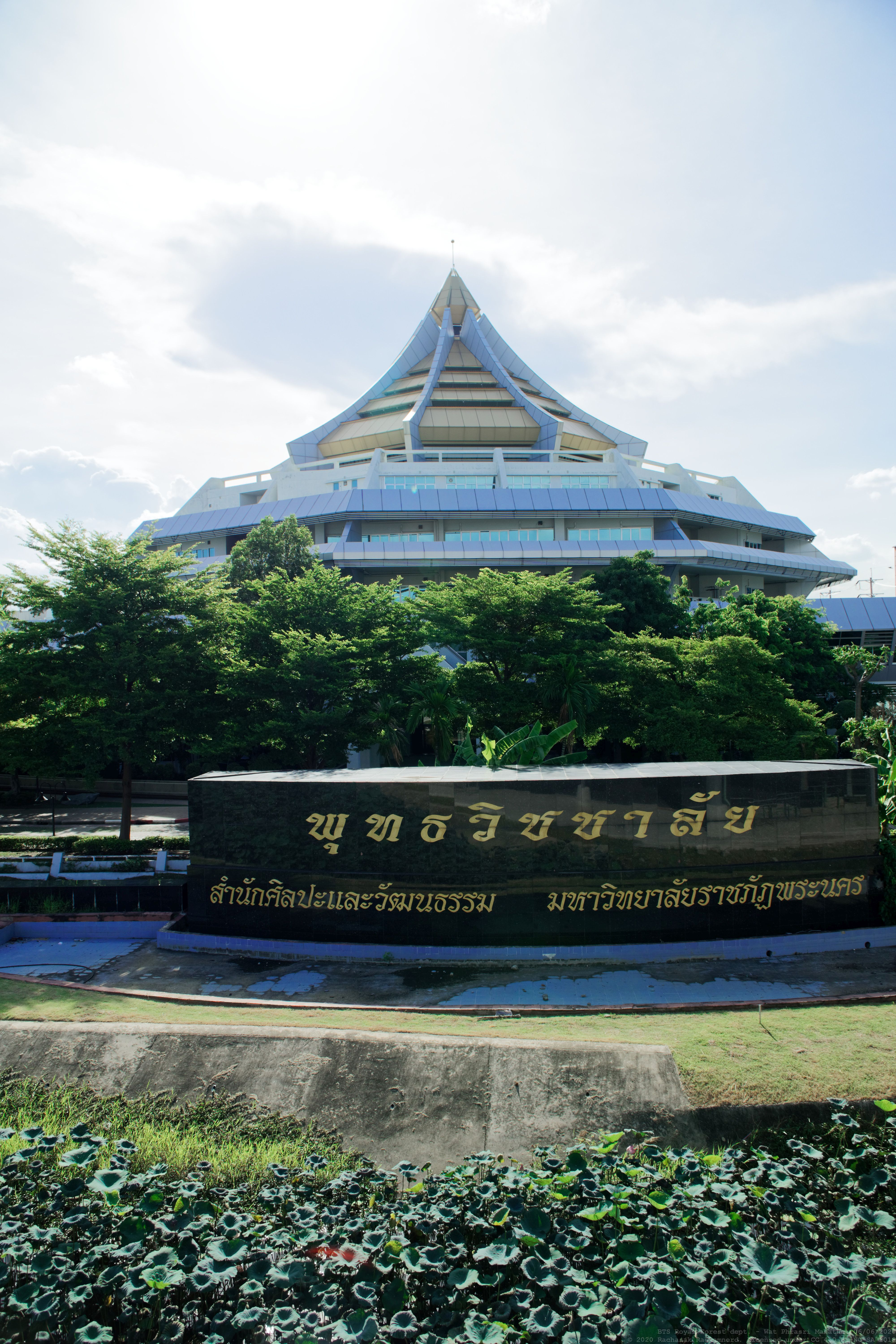 พุทธวิชชาลัย มองจากสถานีอนุสาวรีย์พิทักษ์รัฐธรรมนูญ